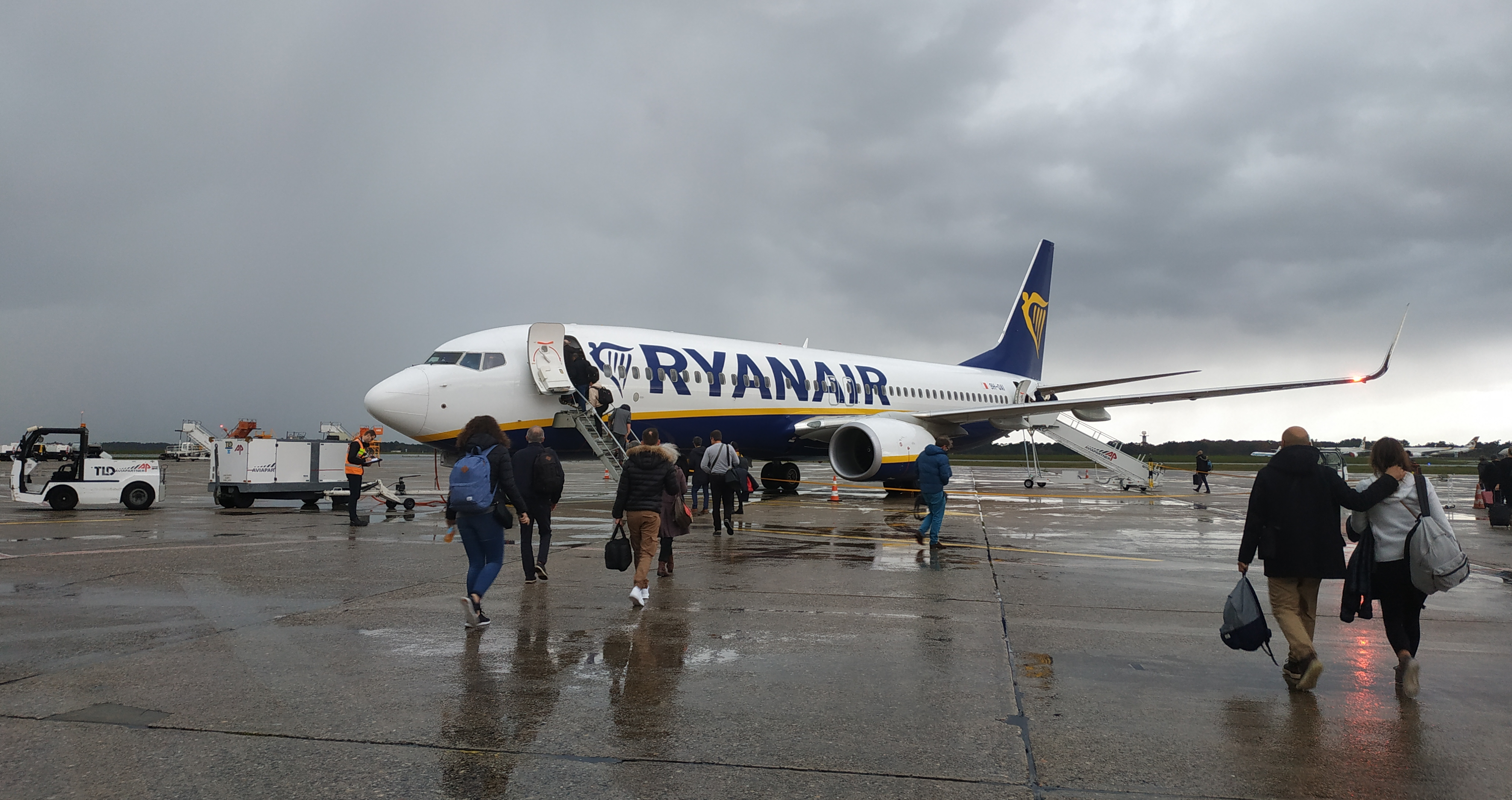 Appareil Boeing 737 de la compagnie Ryanair à l'aéroport de Merignac